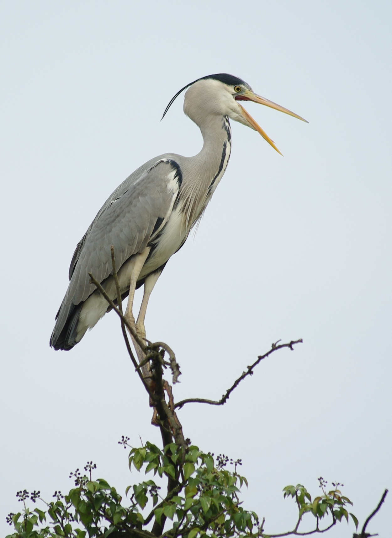 Graureiher (Ardea cinerea), auf einem Baum sitzend, Stadtgarten Karlsruhe